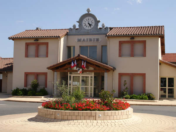 Mairie de L'Hôpital le Grand, Loire, France